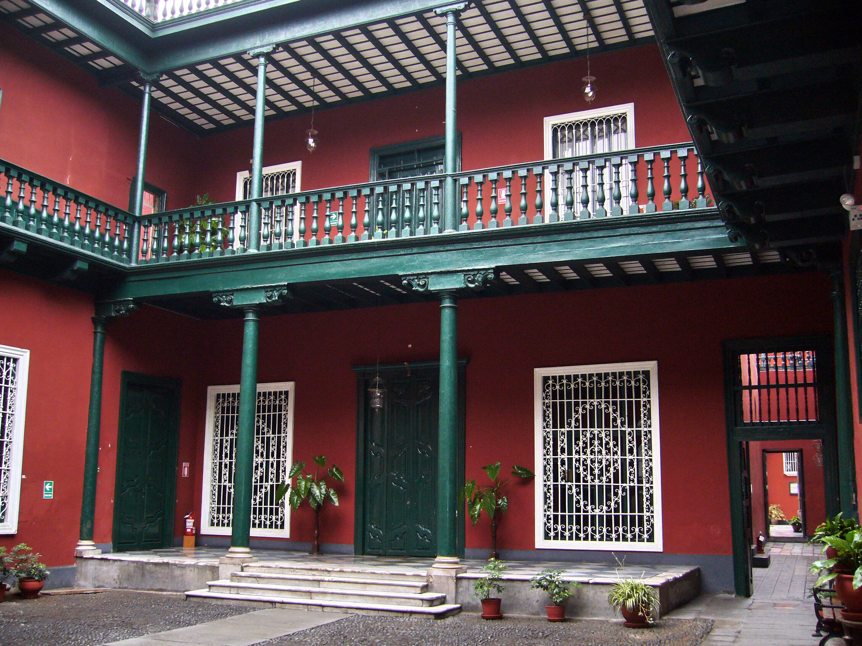 Descripción: Instituto Riva Agüero Lugar: Centro Histórico de Lima Distrito : Cercado de Lima Ciudad : Lima País : Perú Fotógrafo: © Manuel González Olaechea y Franco Fecha de la foto : 11 de julio de 2007